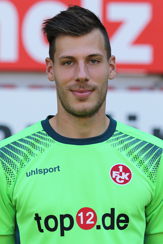 Marius Müller